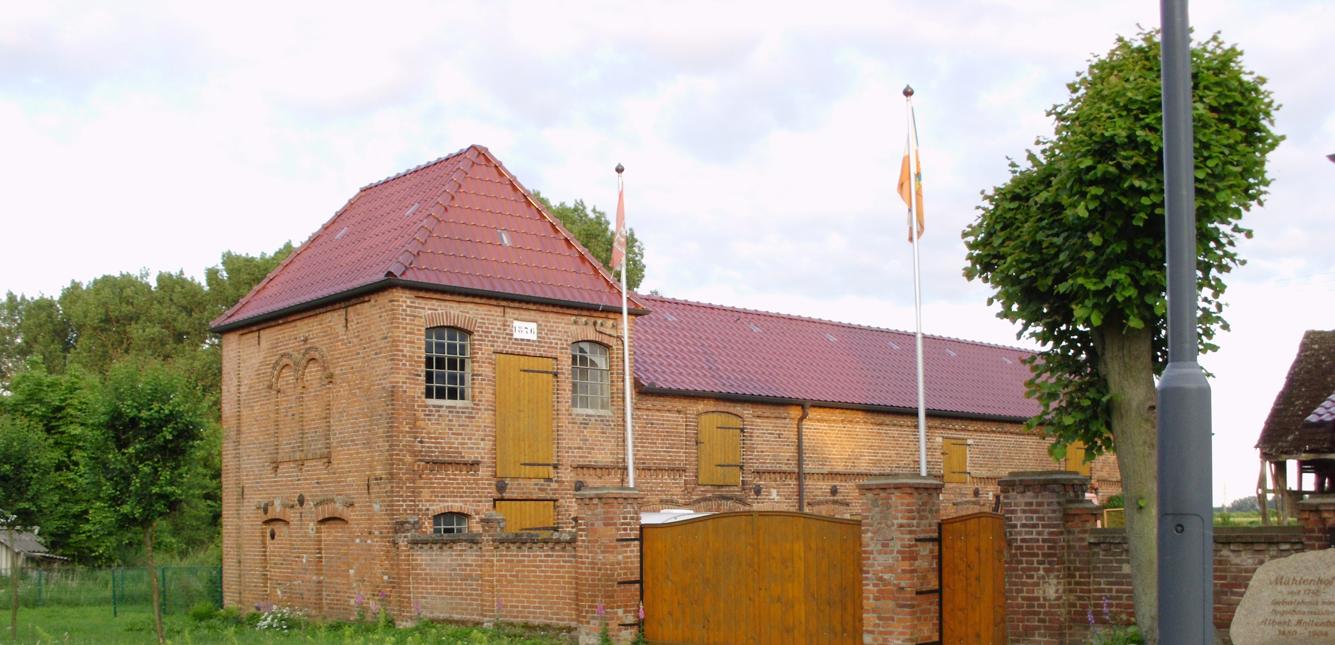 Mühle in Blankenberg, Wusterhausen/Dosse, Landkreis Ruppin, Geburtshaus des Orgelbauers Albert Hollenbach